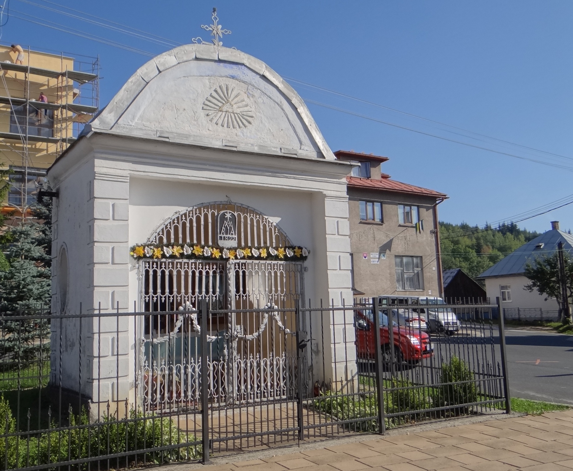 Šumiac